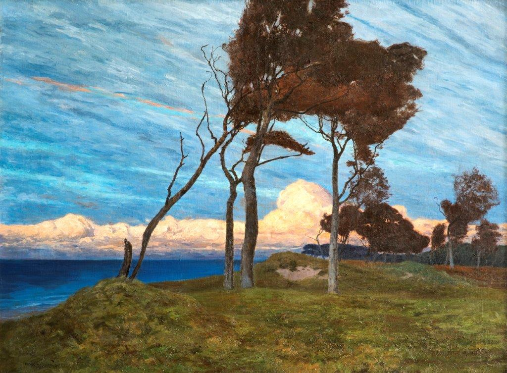 Müller-Kaempff gilt als Gründer der Künstlerkolonie Ahrenshoop.